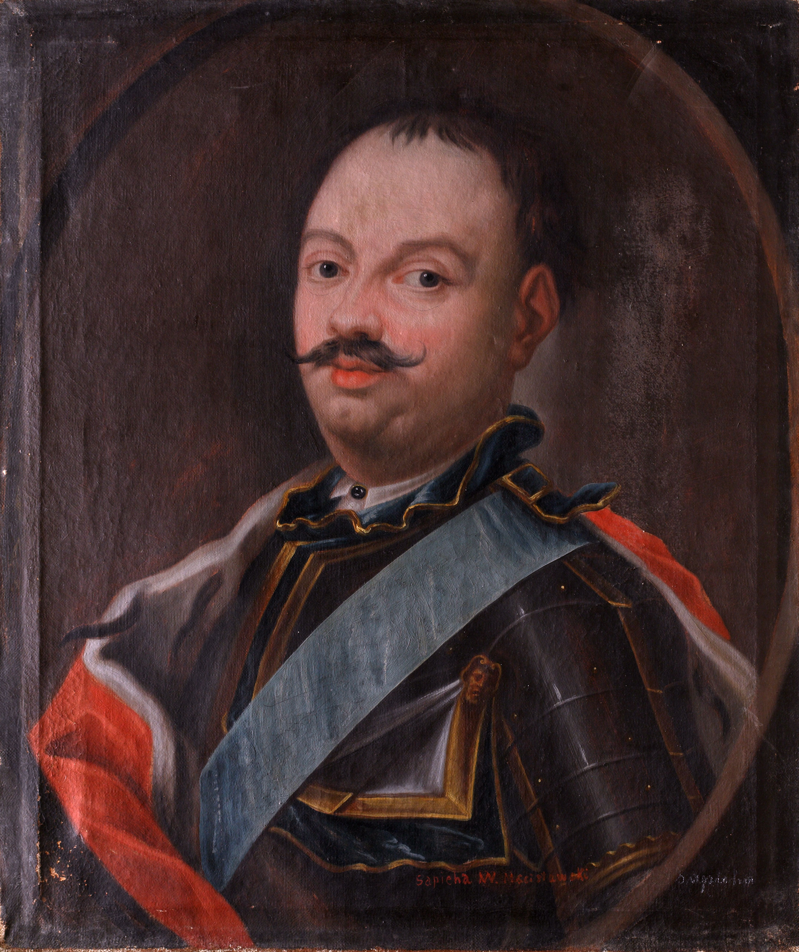 Беларуская (тарашкевіца): Партрэт Ігнація Сапегі (Ihnaci Sapieha)